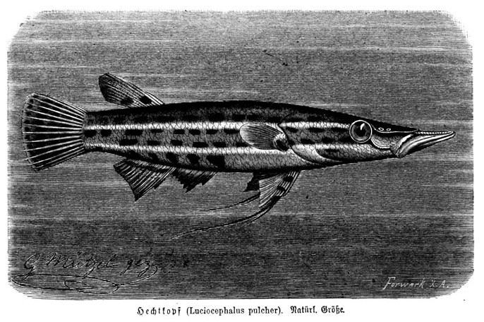 Luciocephalus pulcher from Brehms Tierleben